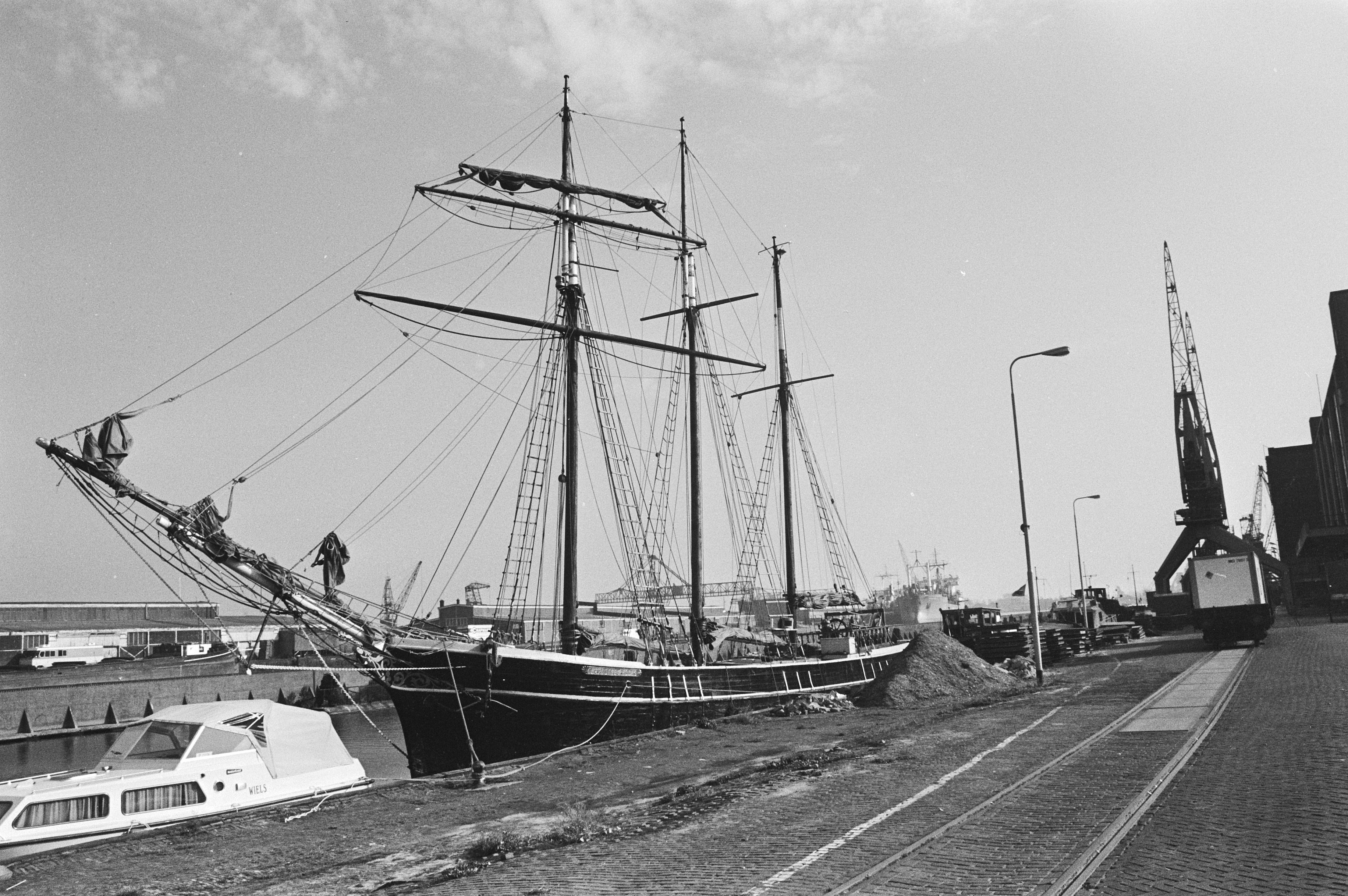 Charlotte Rhodes (schip dat figureerde in de Onedin Line) in beslag genomen door Rijkspolitie te water en versleept van Muidense zeesluizen (Groote Zeesluis) naar Gemeentelijk Handelsentrepotdok Oost (Amsterdam). 9 oktober 1979